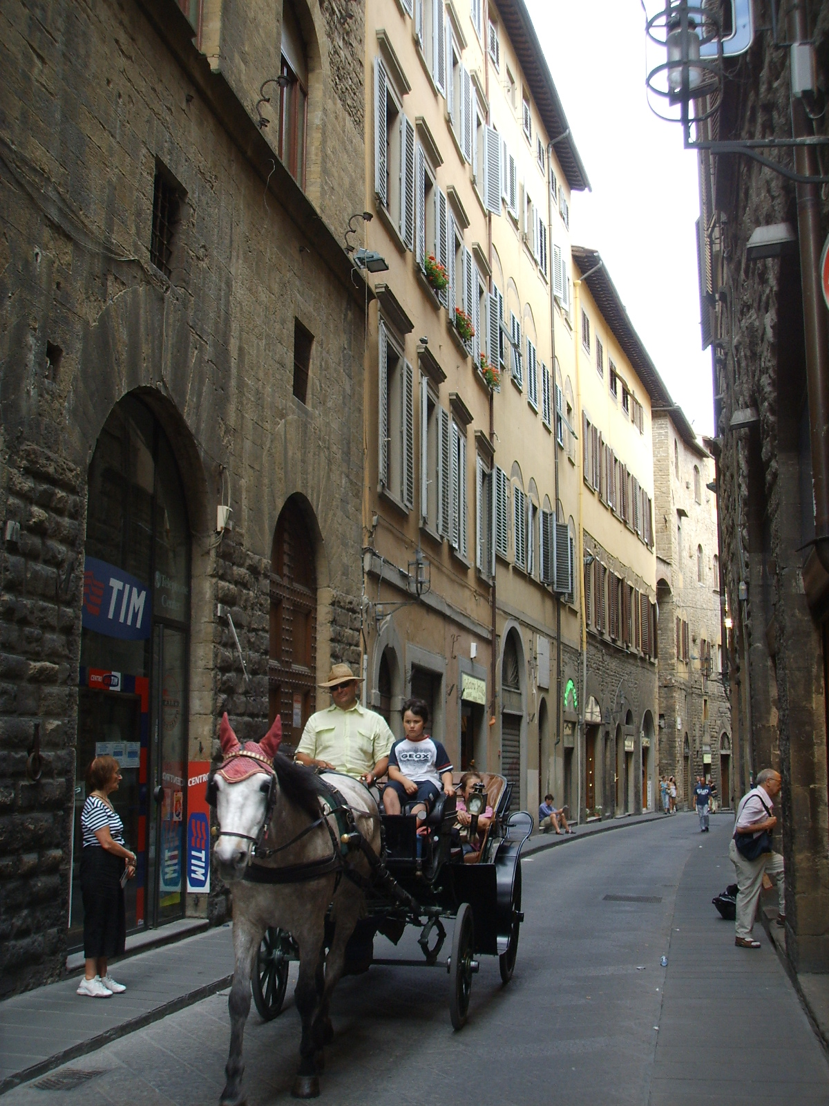 Via della condotta